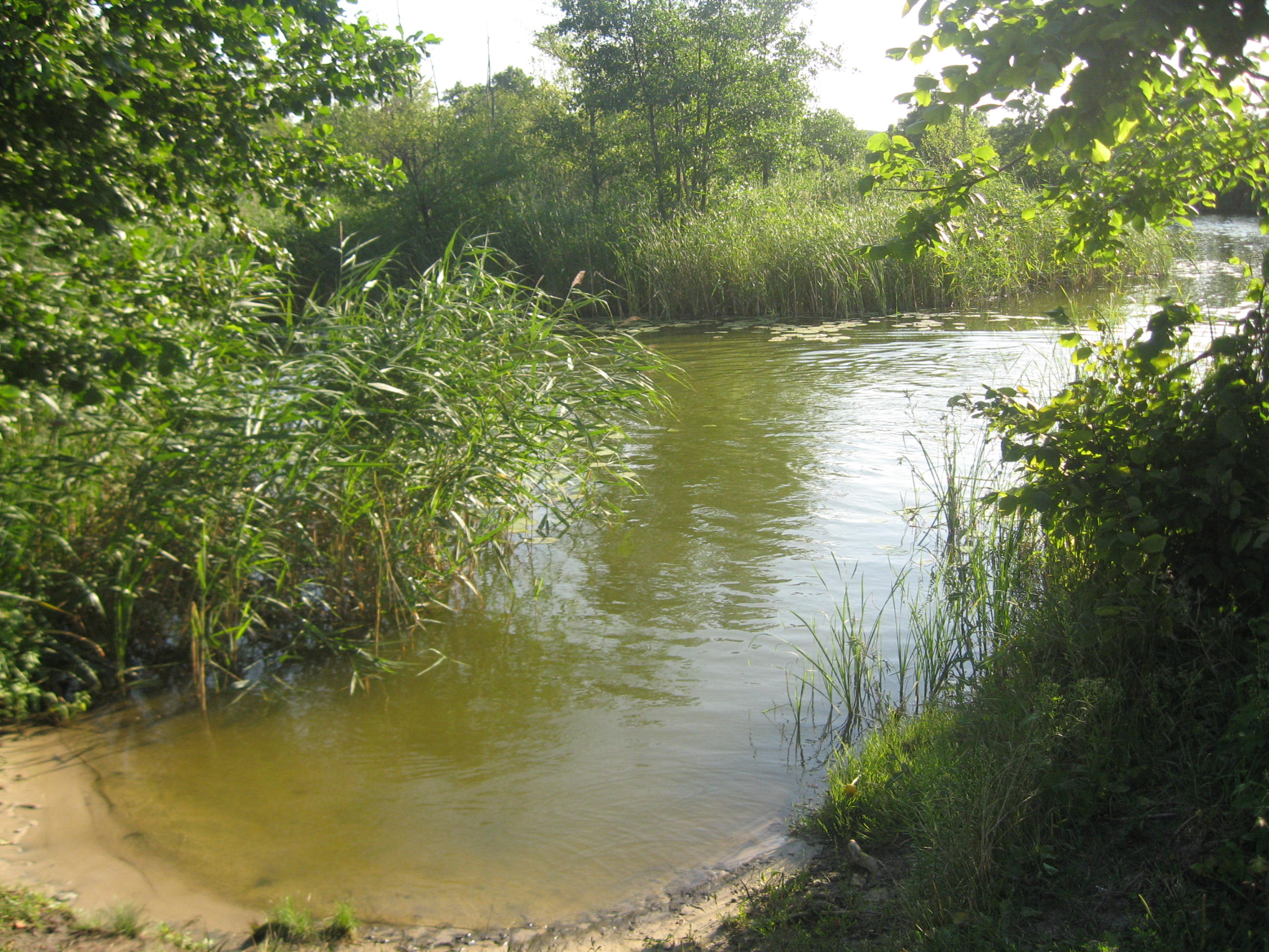 Затон на Курлаке.